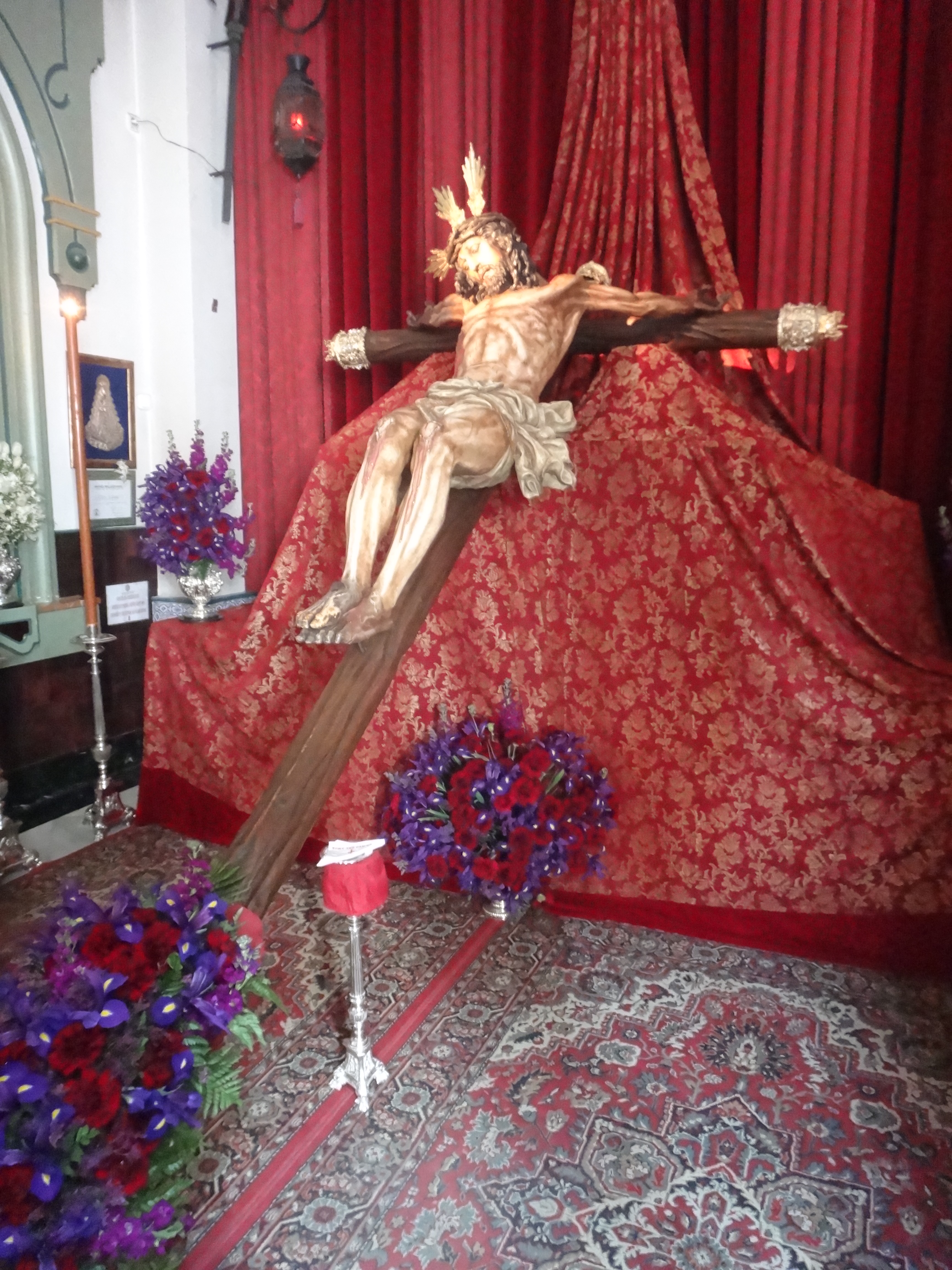 Cristo del Amor en besapies Jerez de la Frontera (Andalucía, España)